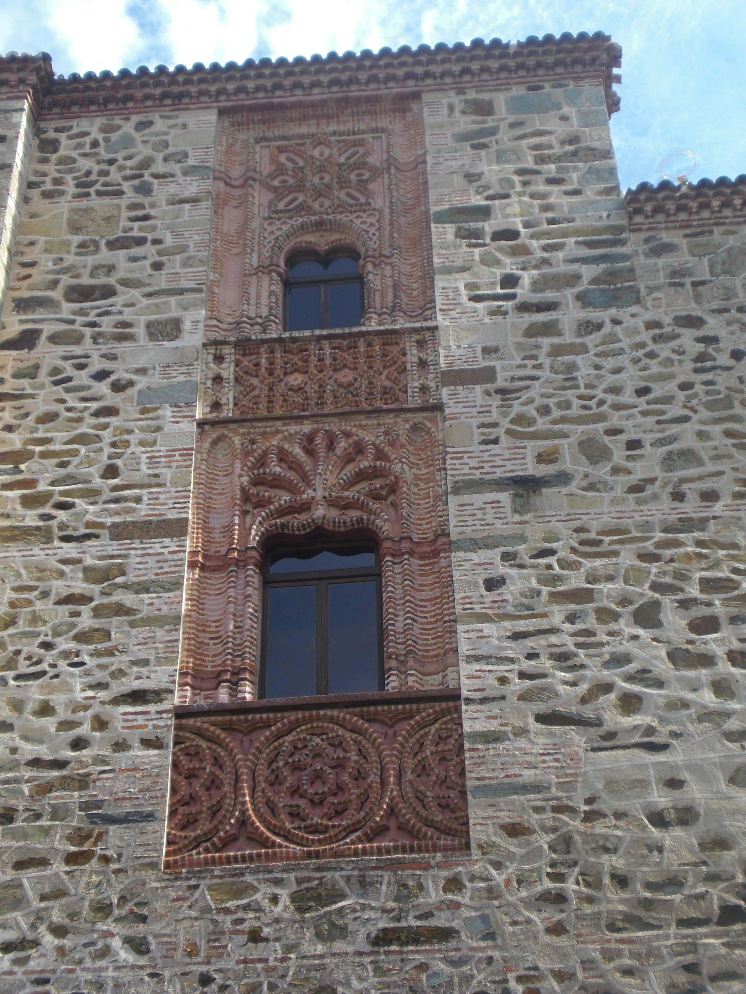 fenestro